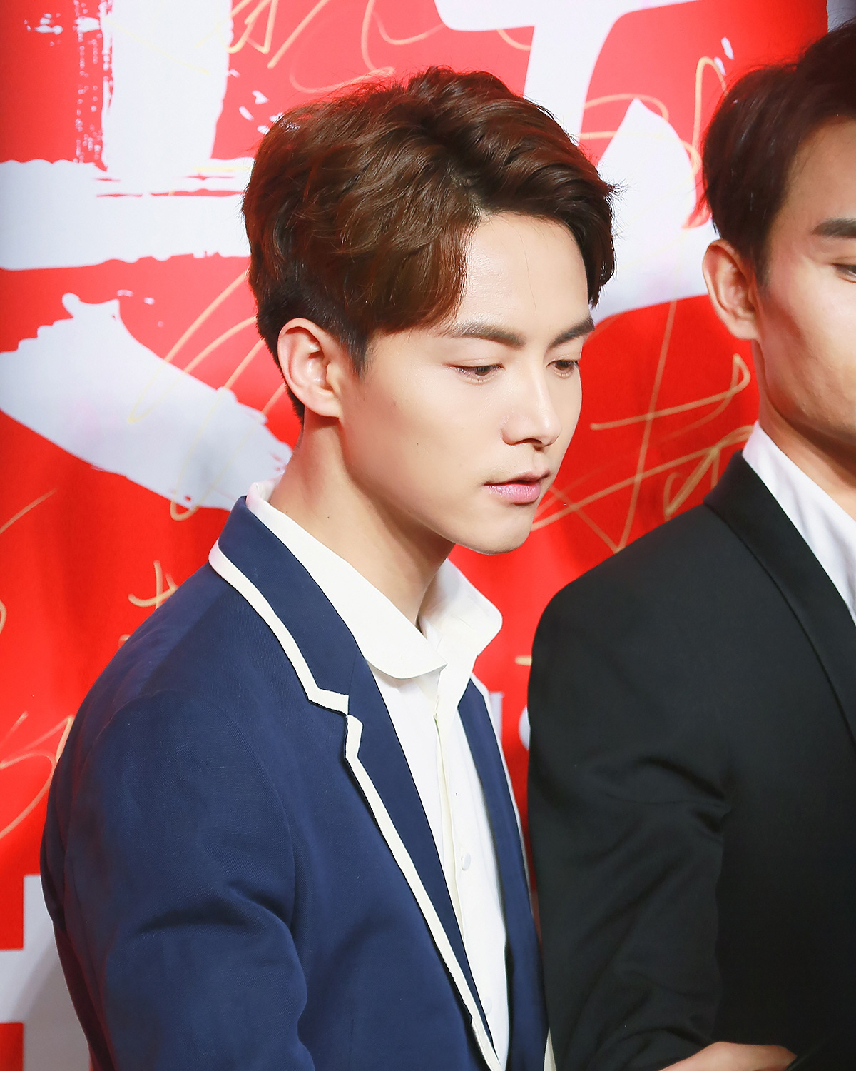 180115 英雄本色2018 首映礼 红毯 马天宇